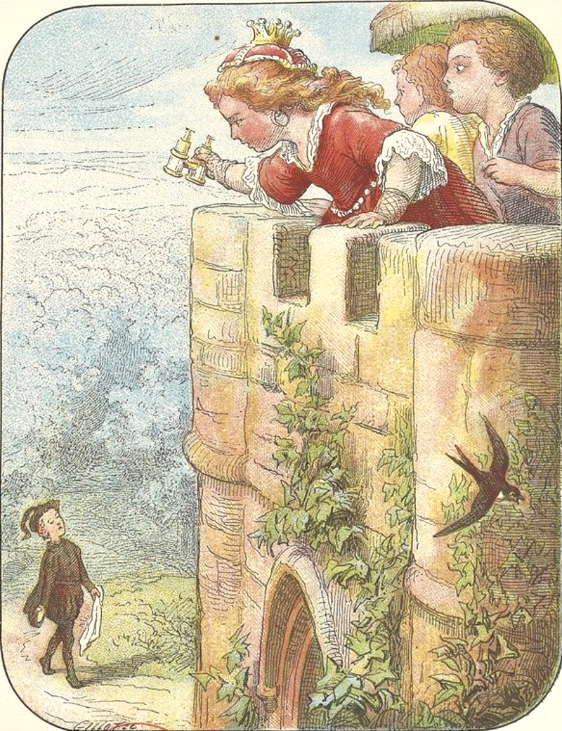 Malbrough s'en va-t-en guerre, 1878, dessins par Frølich (1820-1908), textes par Stahl, Hetzel éditeur ː page 1.